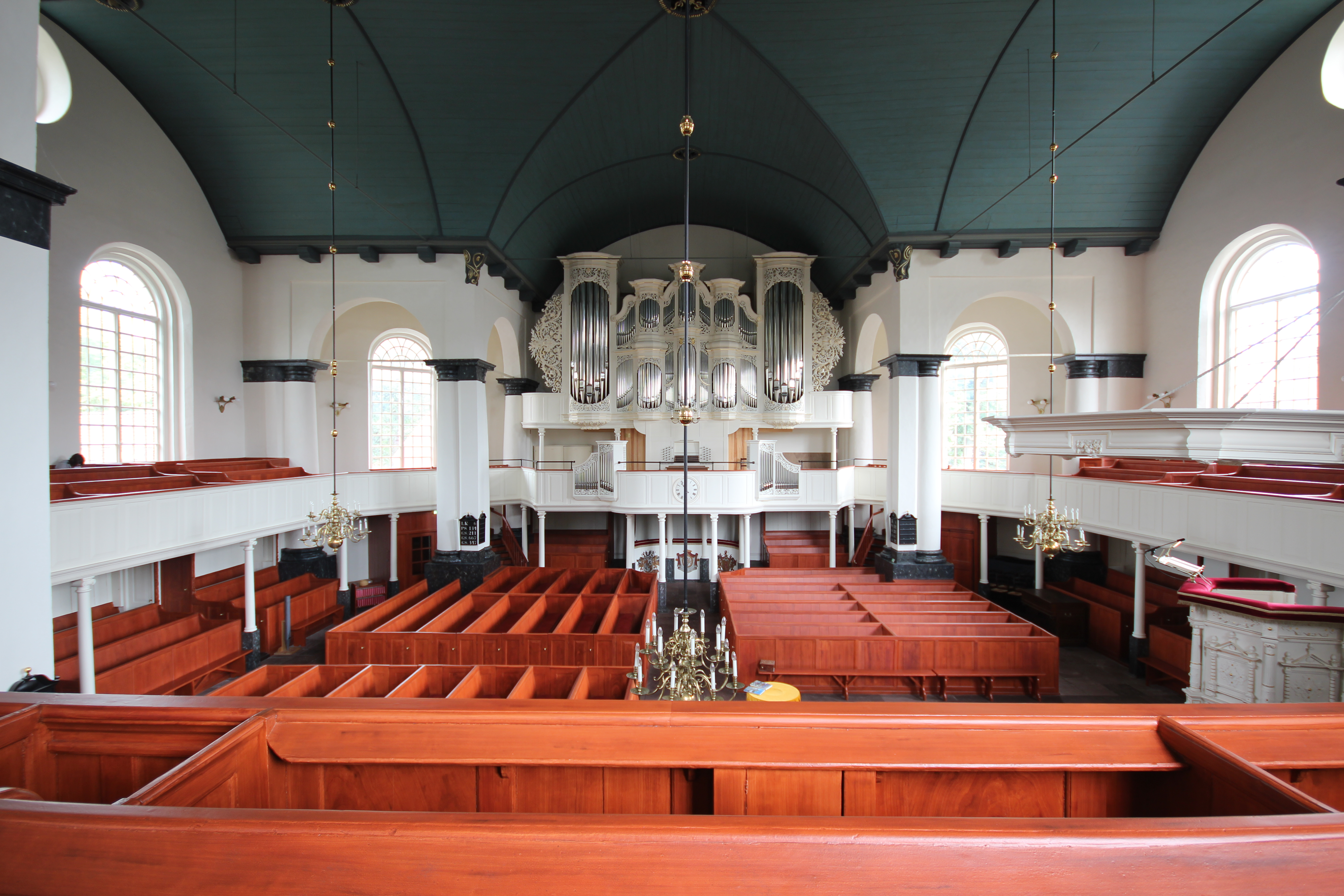 Große Kirche zu Leer, Ostfriesland, mit Orgelempore